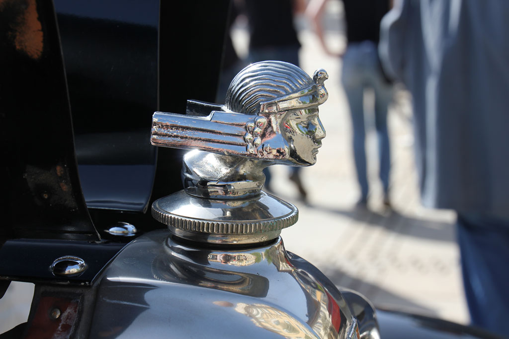 1926 Stutz Sedan_IMG_4125